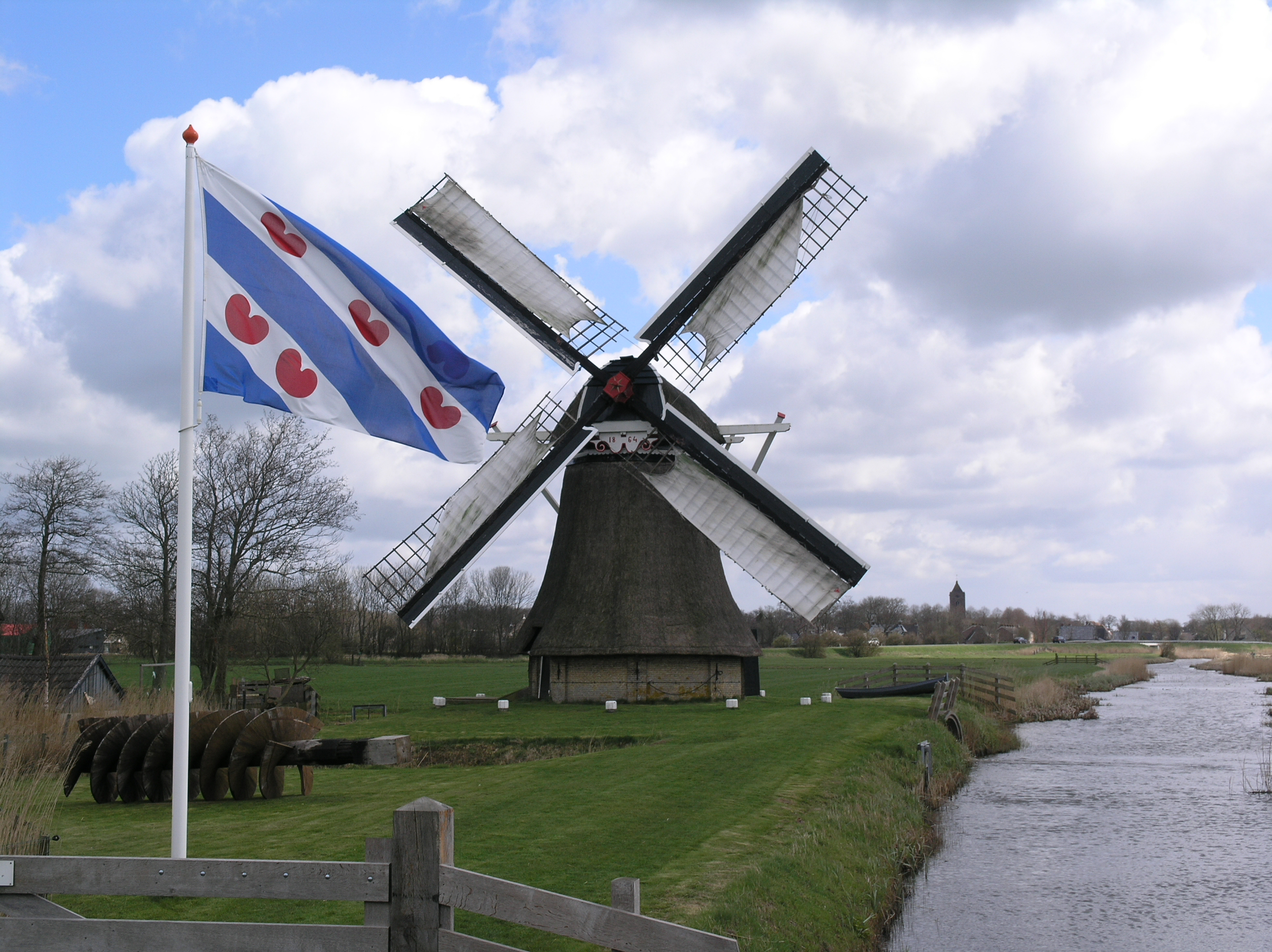 Oudkerk Poldermolen Oudkerkermolen